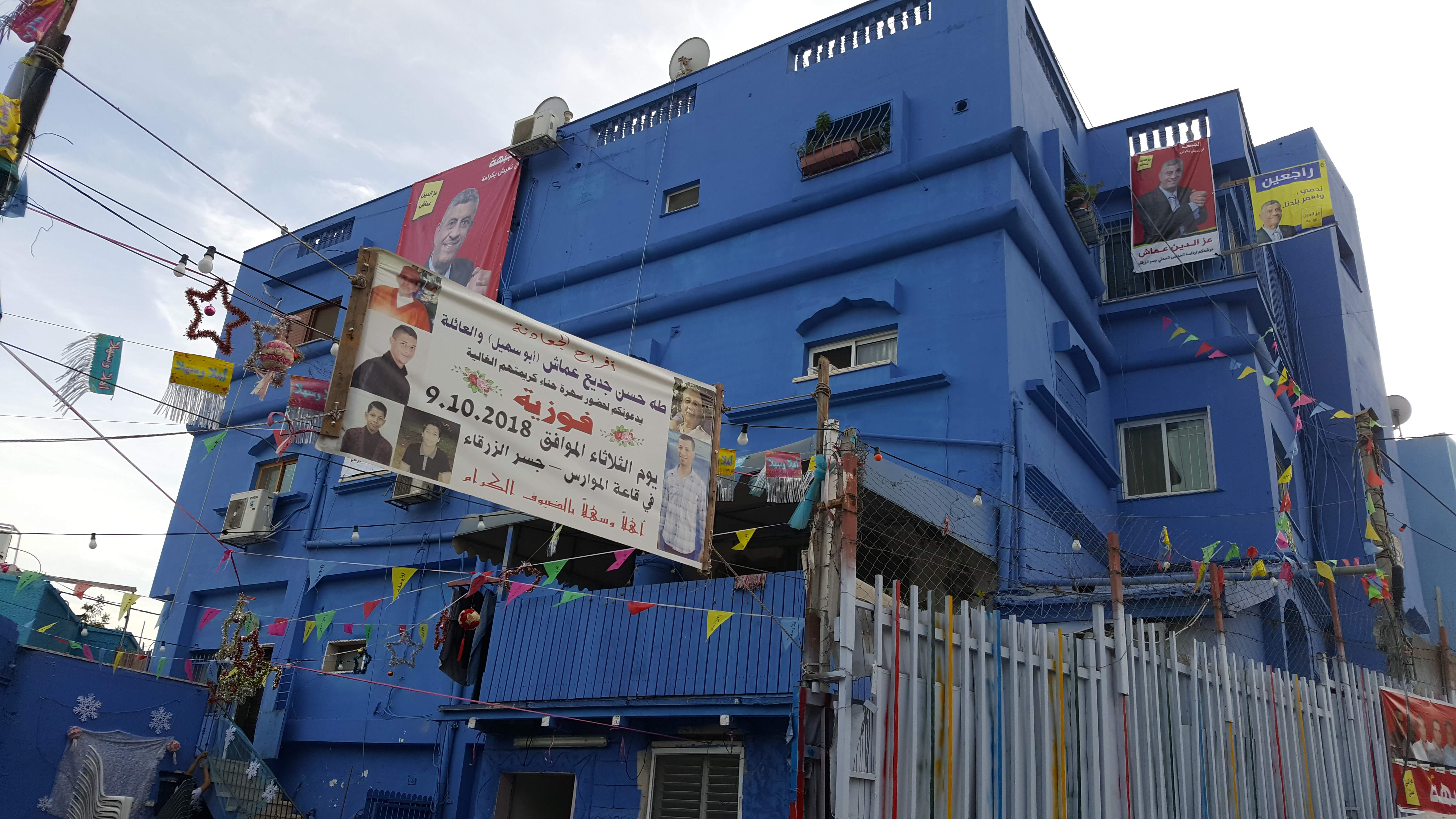 ג'סר א-זרקא - תל תנינים